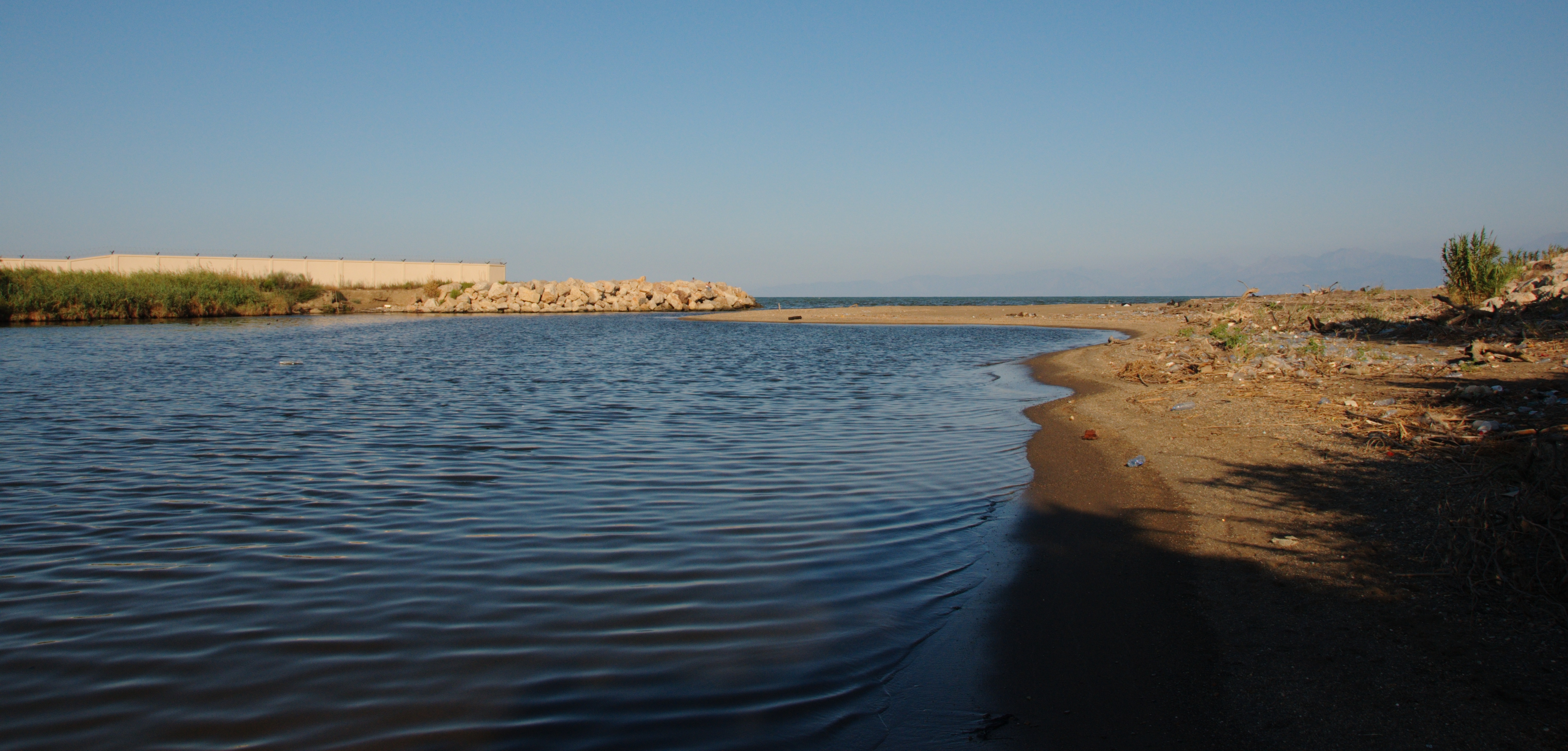 Estuaire de l'oued Soummam